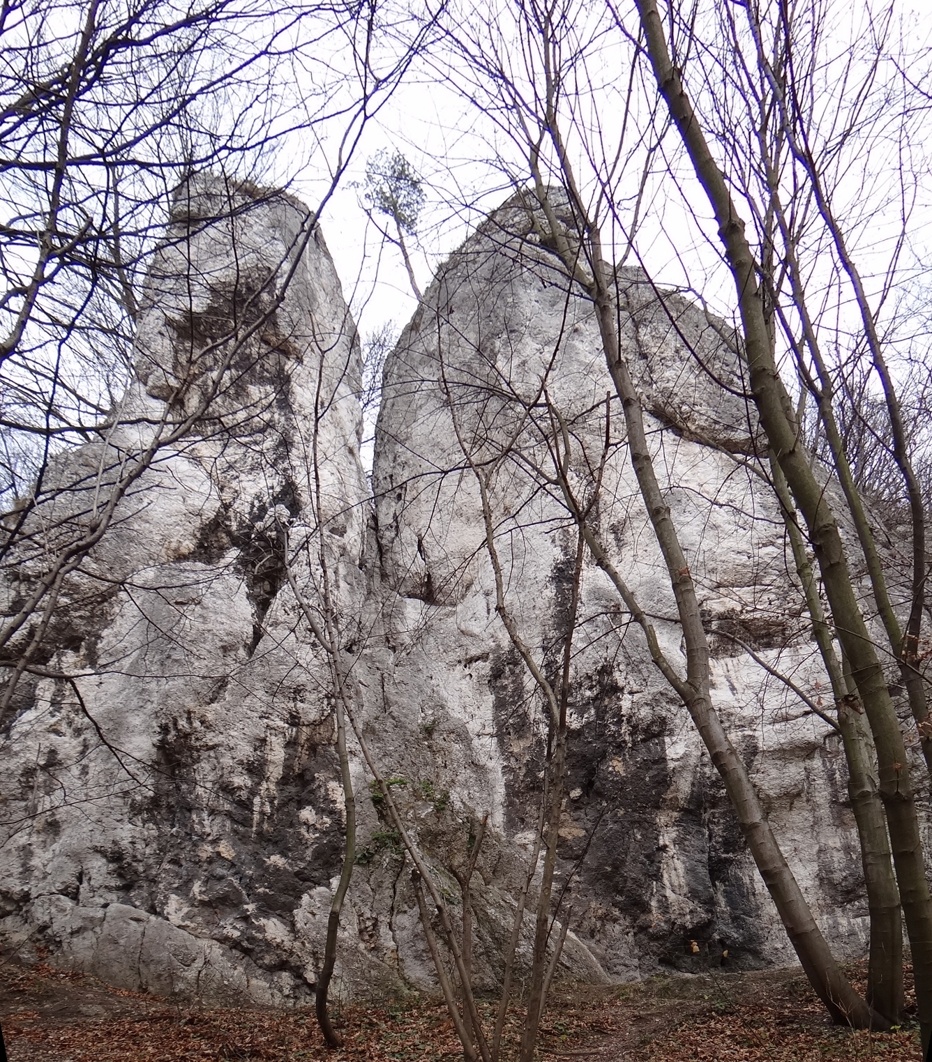 Chorobliwa Grań w Dolinie Kobylańskiej